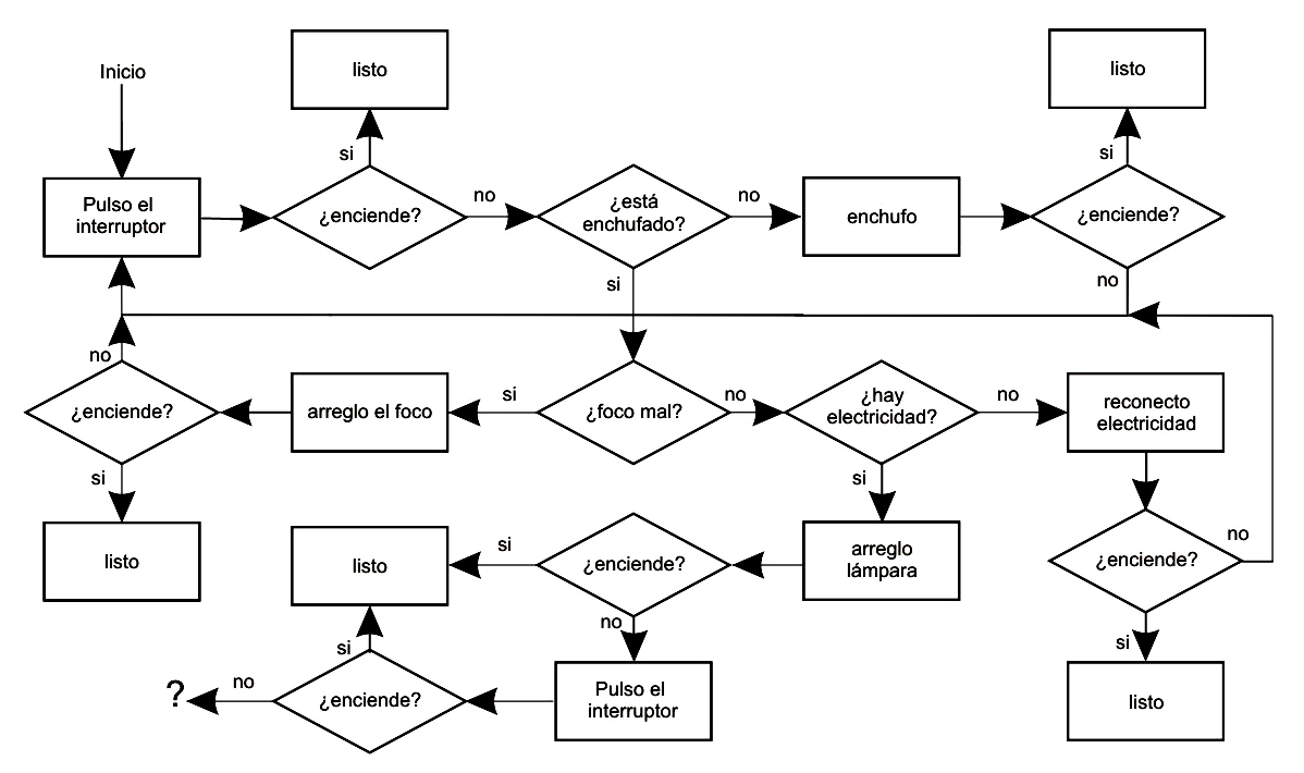 Ejemplo simple del modelo de condición-acción en Informática